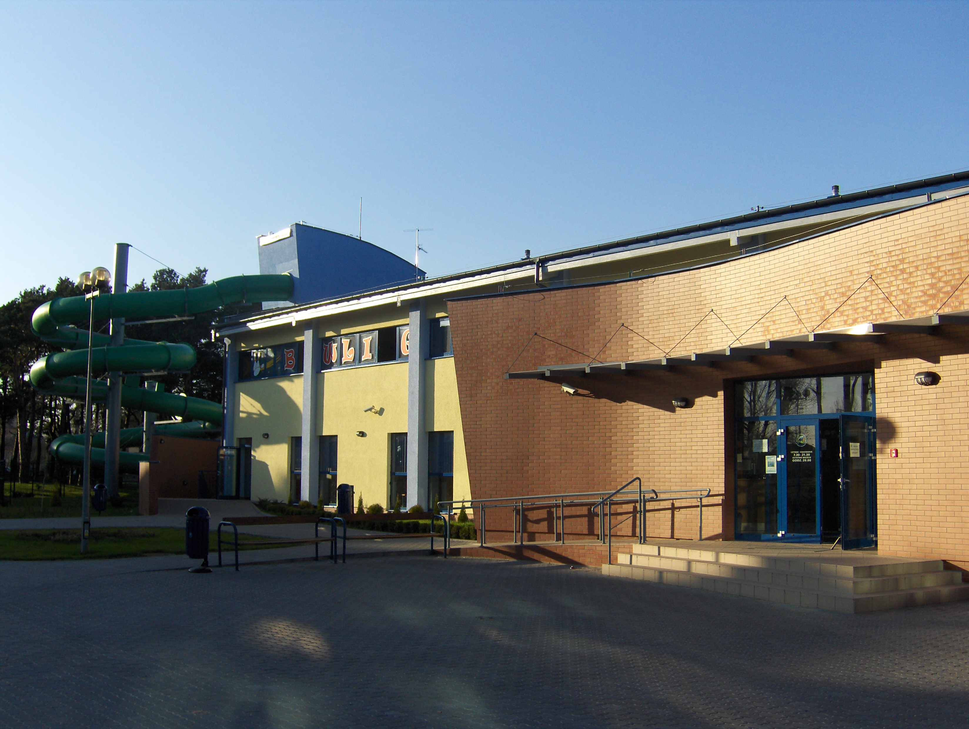 Aquapark "Wisła" - Solec Kujawski